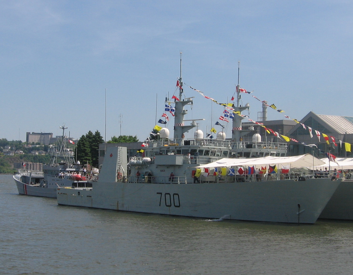 NCSM KINGSTON (MM 700)